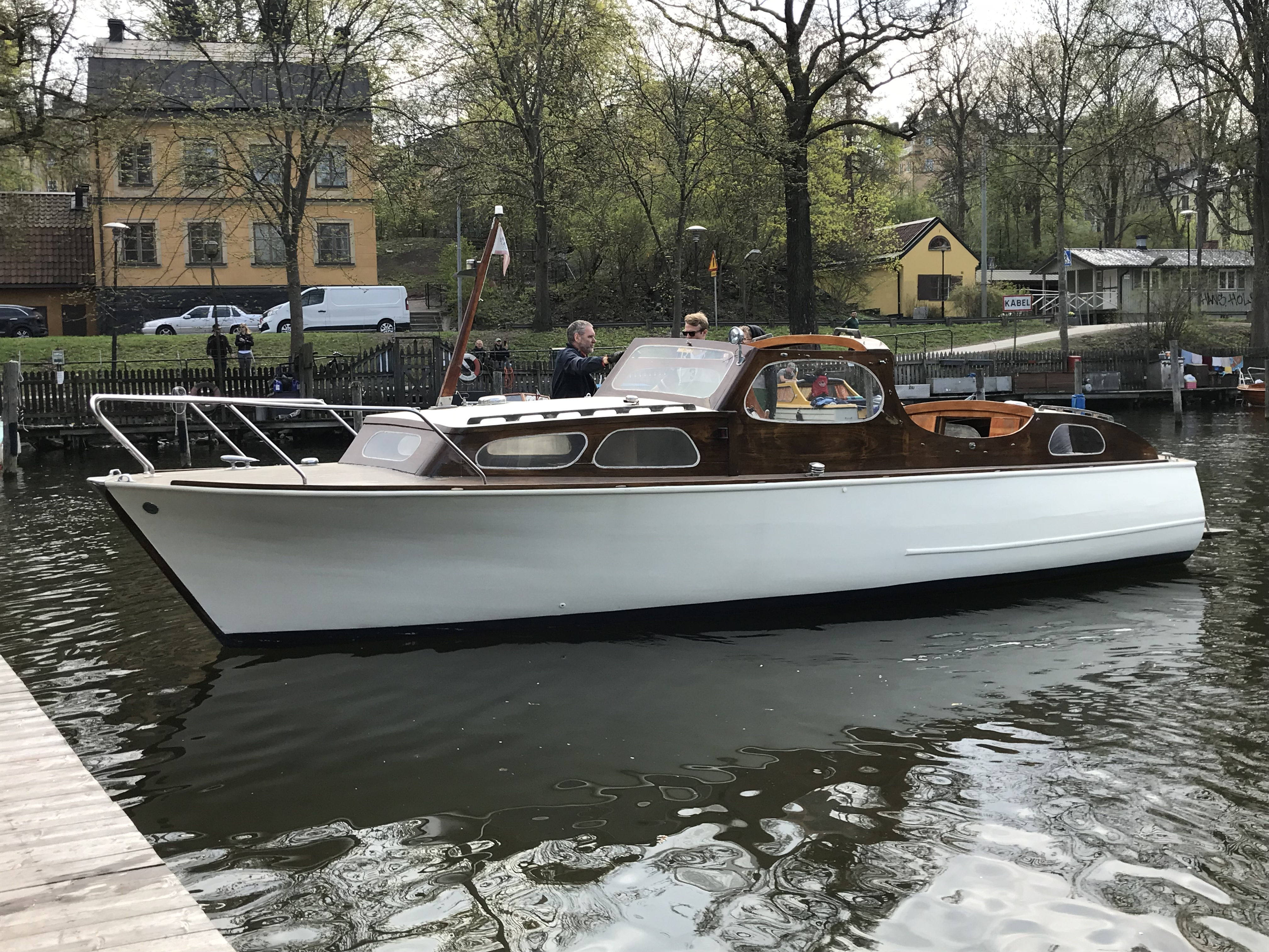 "Oxelösundaren" Dora-Bella, en dubbelruffad motorbåt från 1958 ritad av Sven Söderkvist och byggd av Söderkvists båt- och snickeriverkstad i Oxelösund, fotograferad vid Heleneborgs båtklubb i Pålsundet i Stockholm.